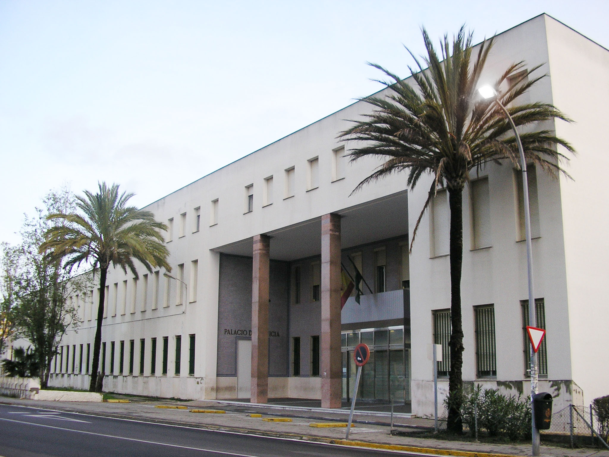 Juzgados de Algeciras, Andalucía, España.